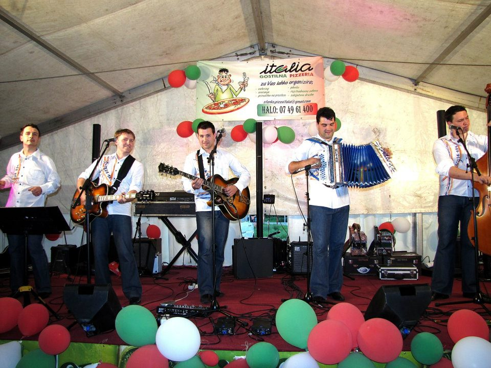 Ansambel Pogum na 10-letnici Gostilne in picerije Italija v Brežicah.